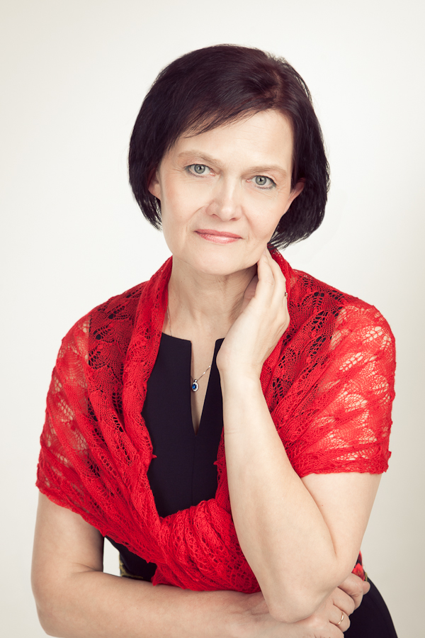 Koorijuhi Külli Lokko portreefoto